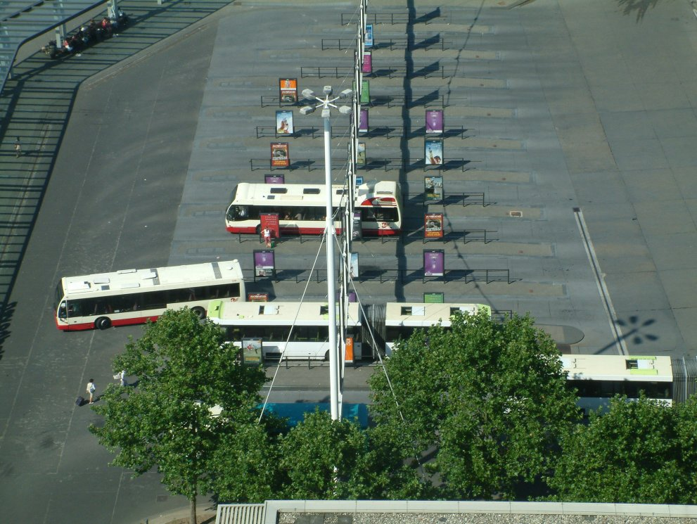 Busstation Neckerspoel in Eindhoven (Noordzijde, Station NS)